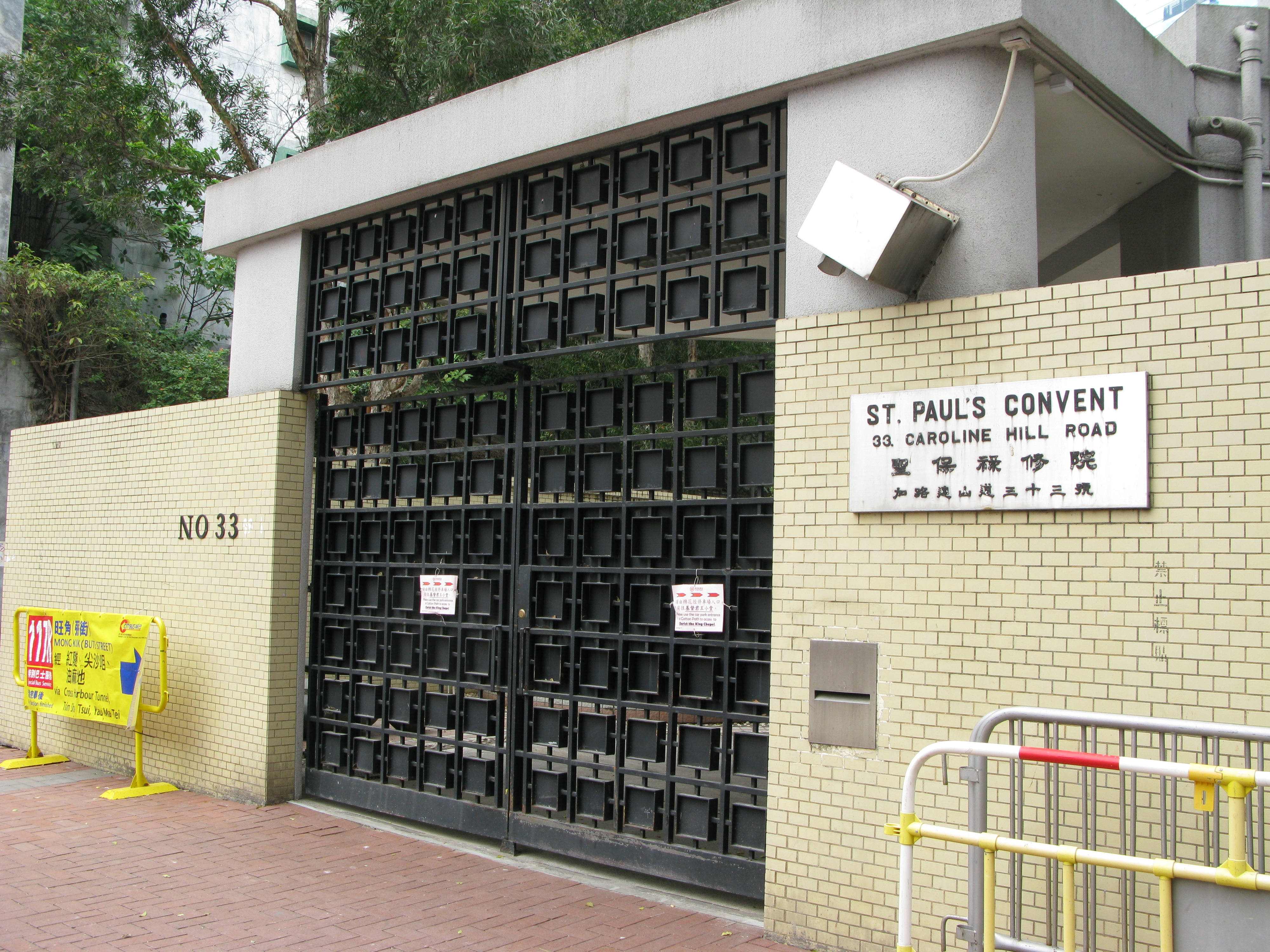 中文（香港）: 香港棉花路聖保祿修院門口